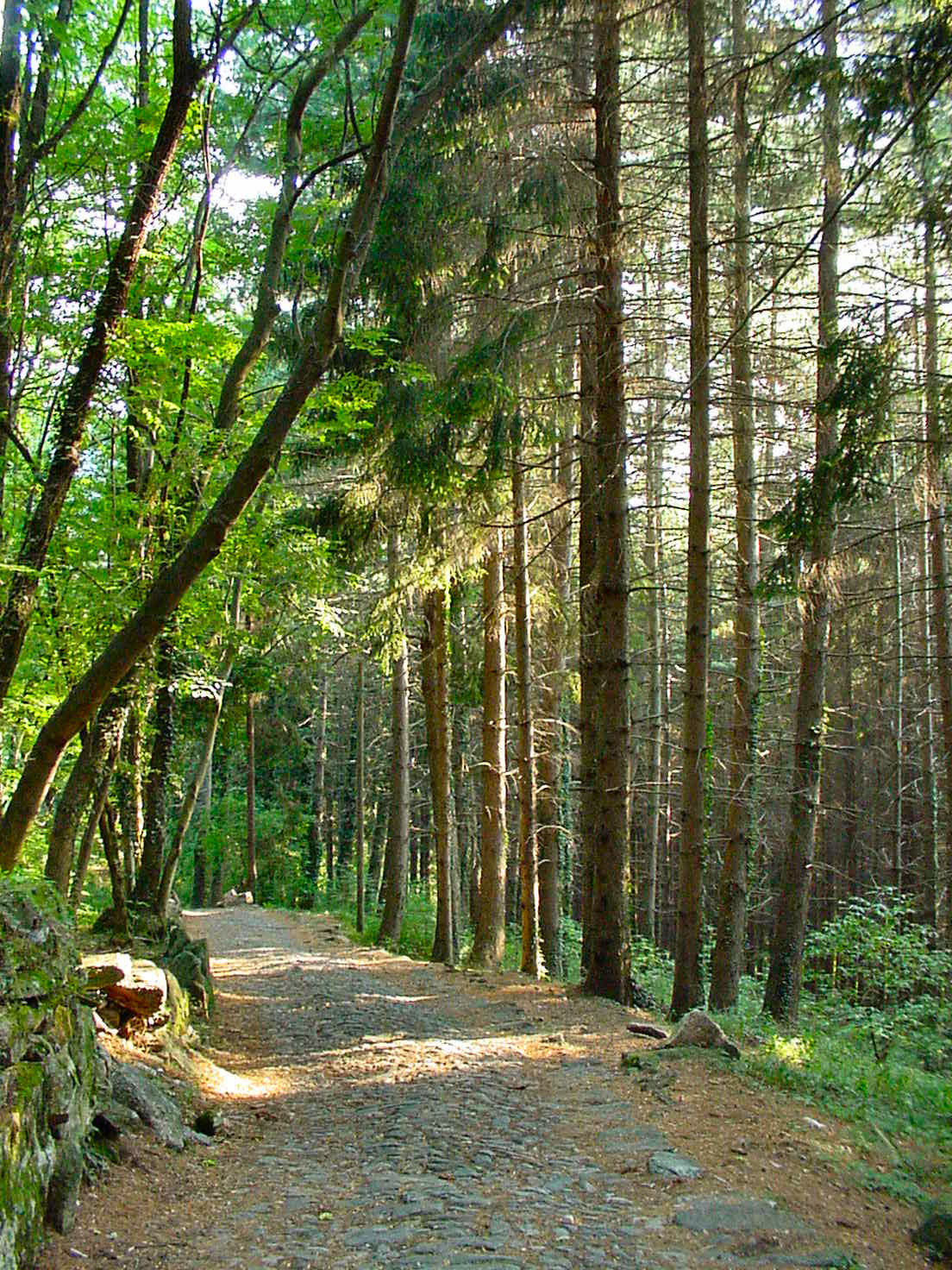 Road to Terza Alpe - Canzo - Como